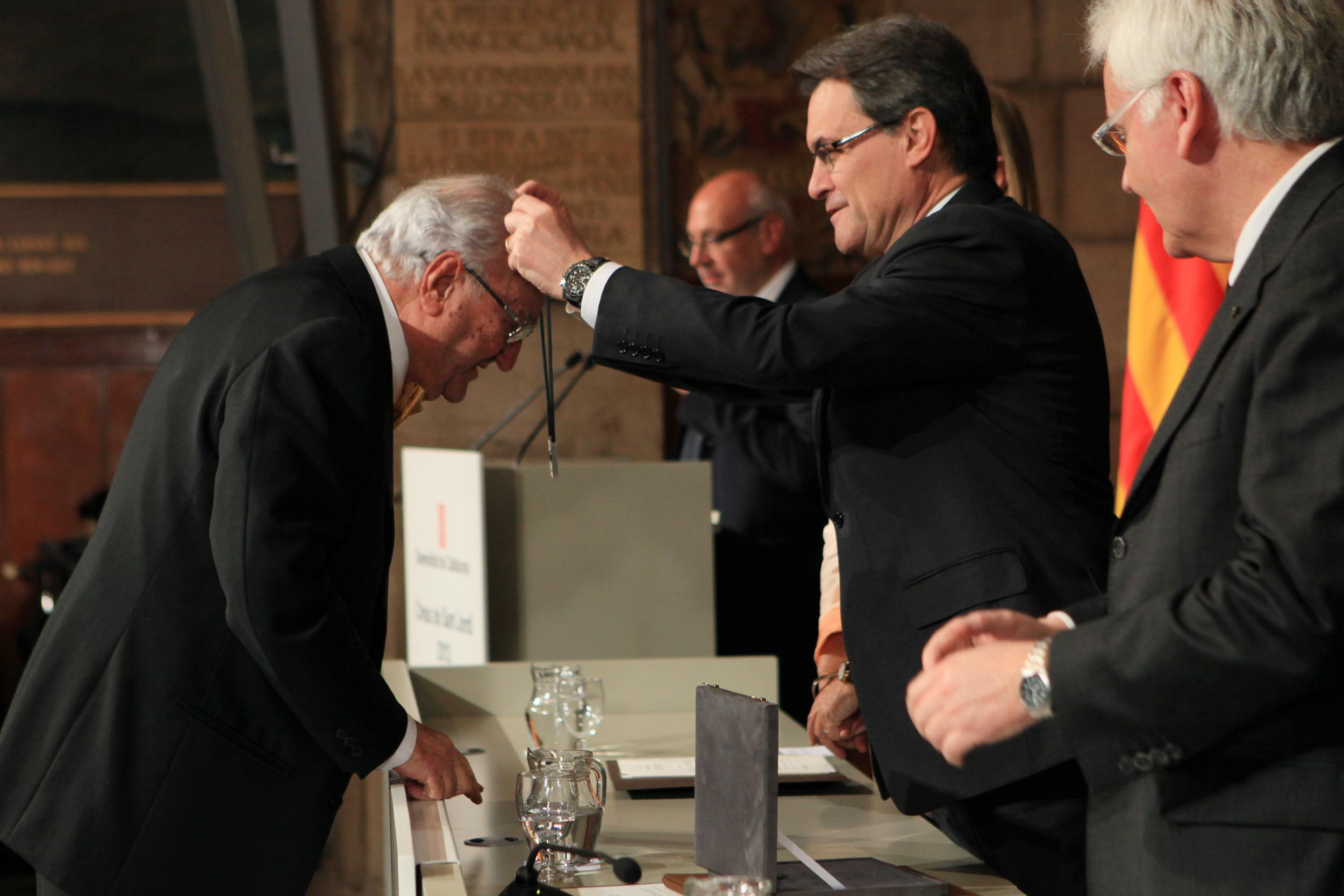 Raimon Carrasco i Azemar rebent creu de Sant Jordi